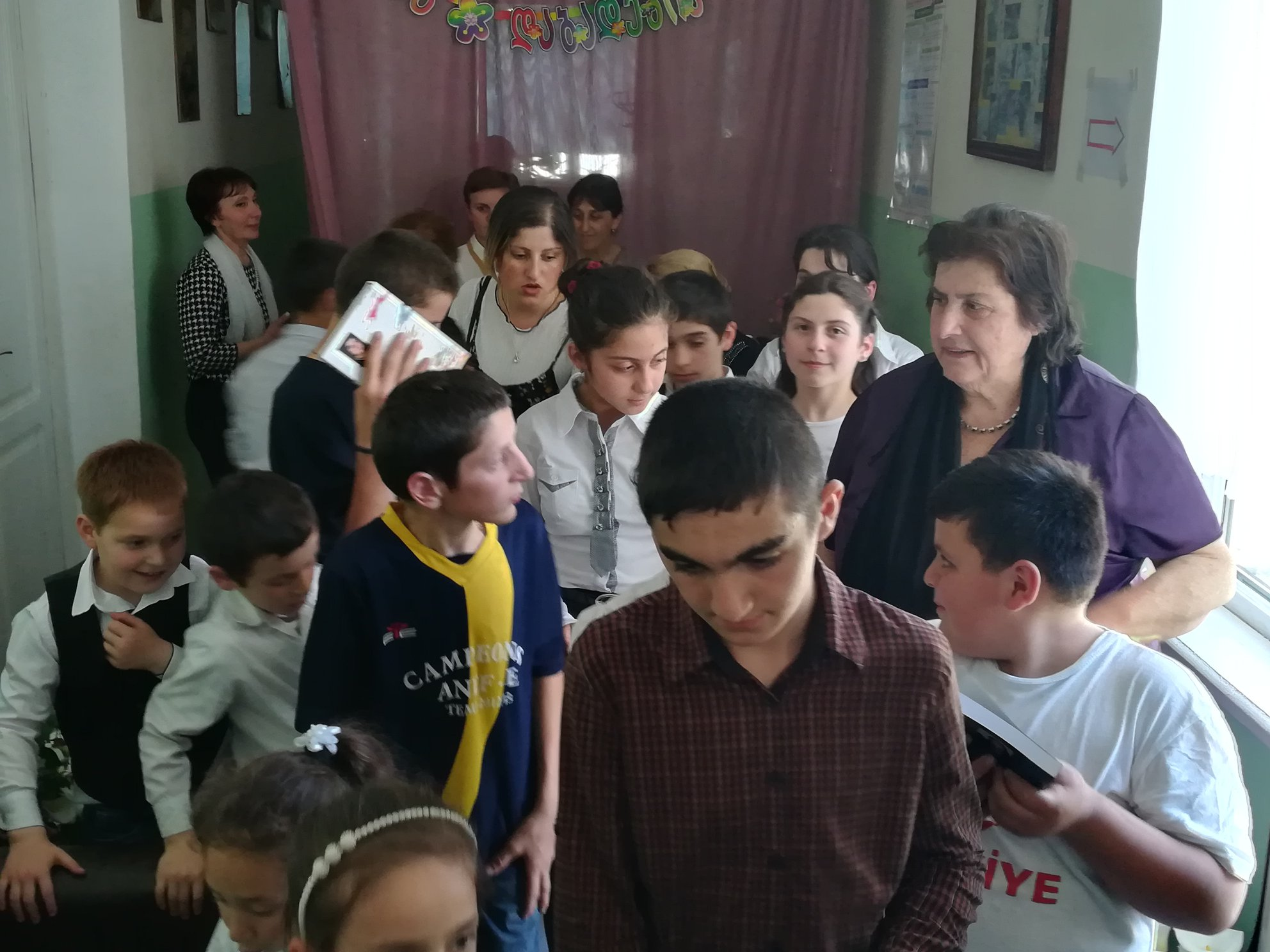 იუბილე